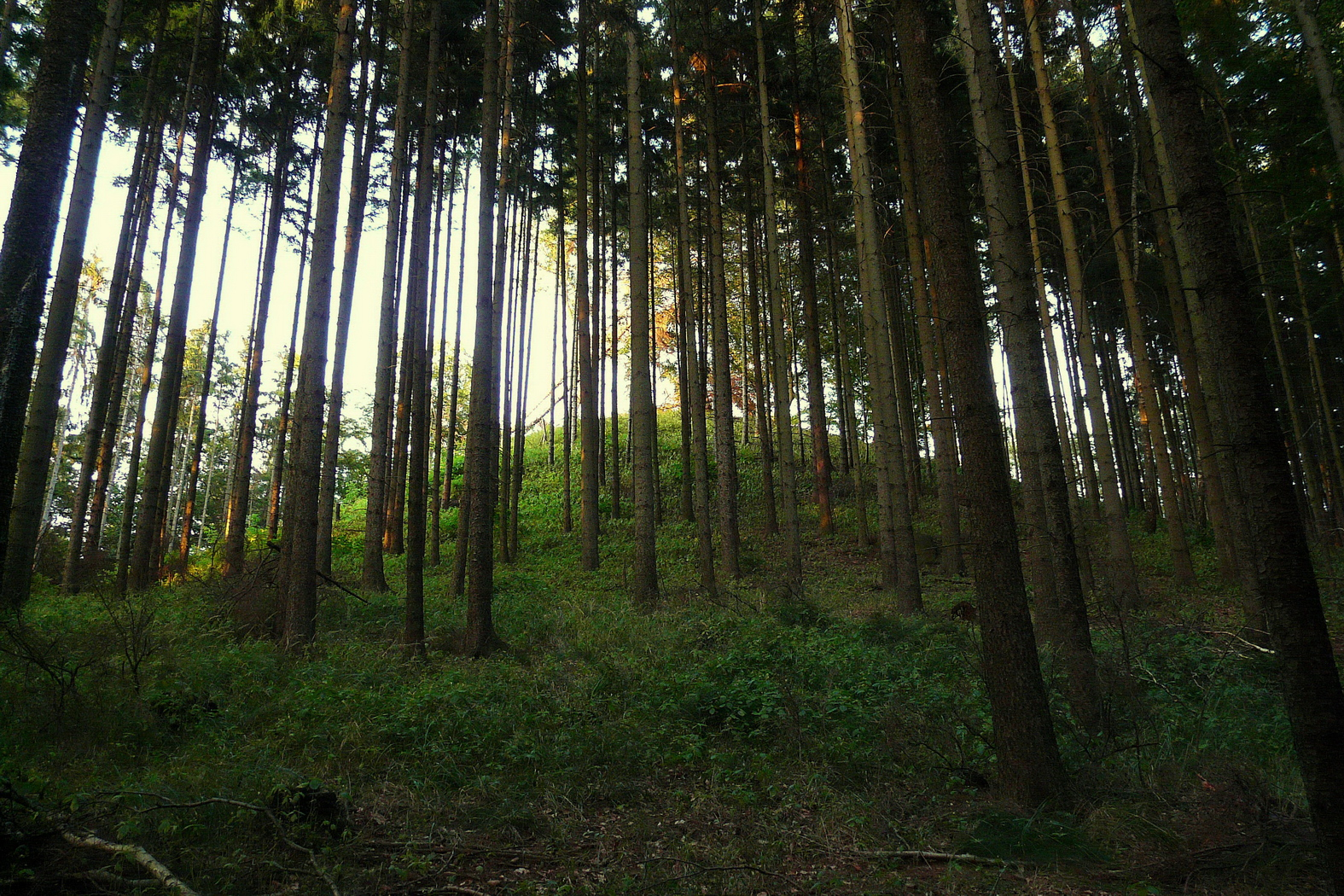 Vrchol Holého vrchu